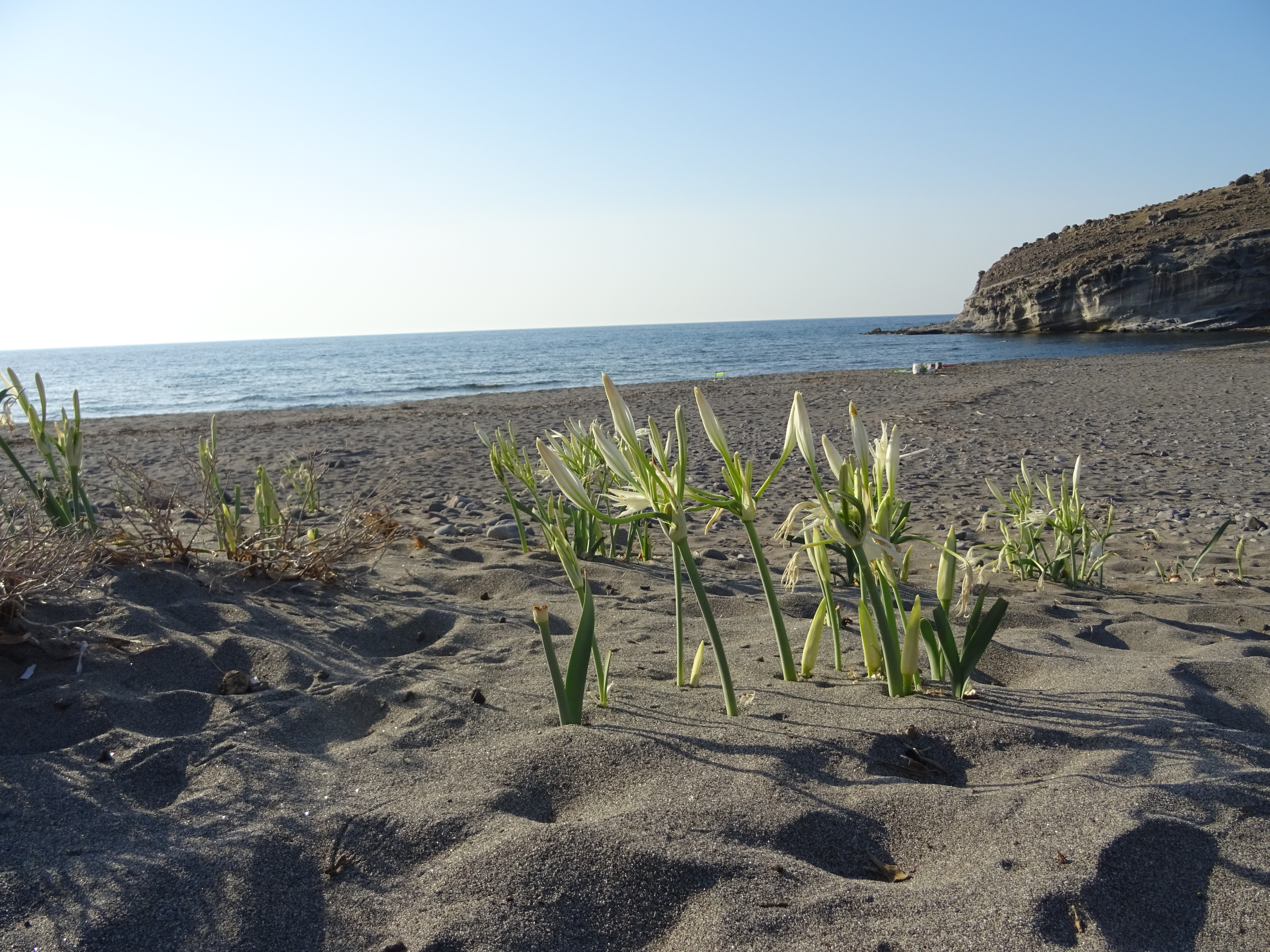 Κρίνοι να φυτρώνουν στην αμμουδιά This is a photography of Natura 2000 protected area with ID GR4110002